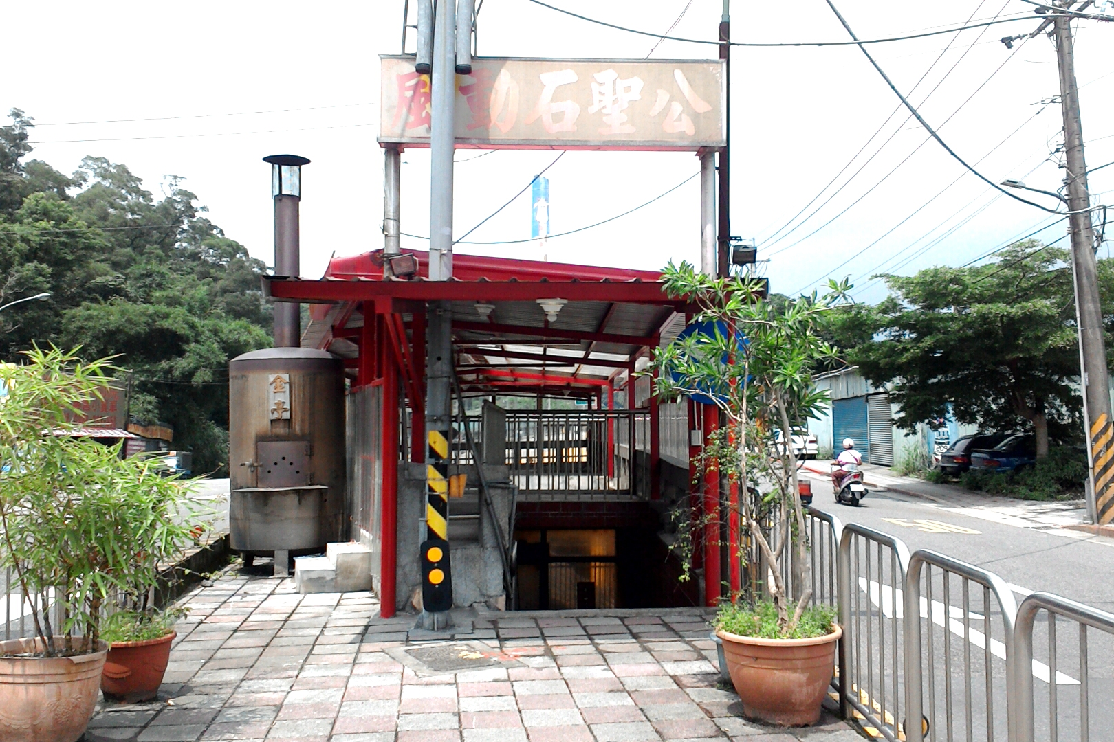 風動石聖公廟正面,台北市文山區萬芳次分區博嘉里